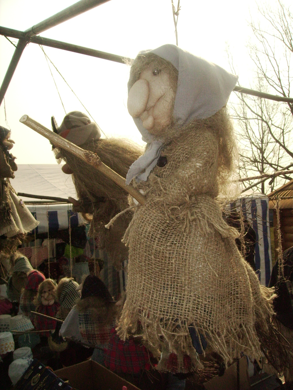 Ragana